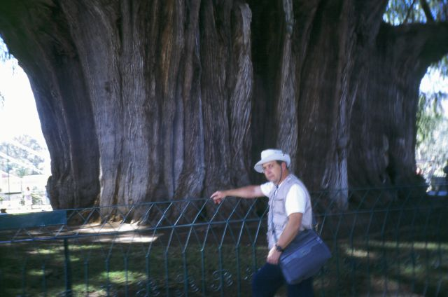 Foto obtida em fev.2004, em Santa Maria del Tule, Oaxaca, MÃ©xico, por Altevir Vechia